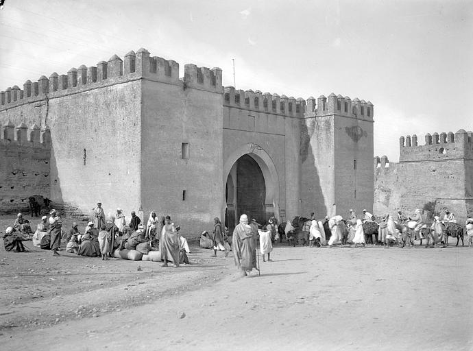 Porte Bab-Ftouh à Fès, au Maroc, Georges-Louis Arlaud, vers 1925